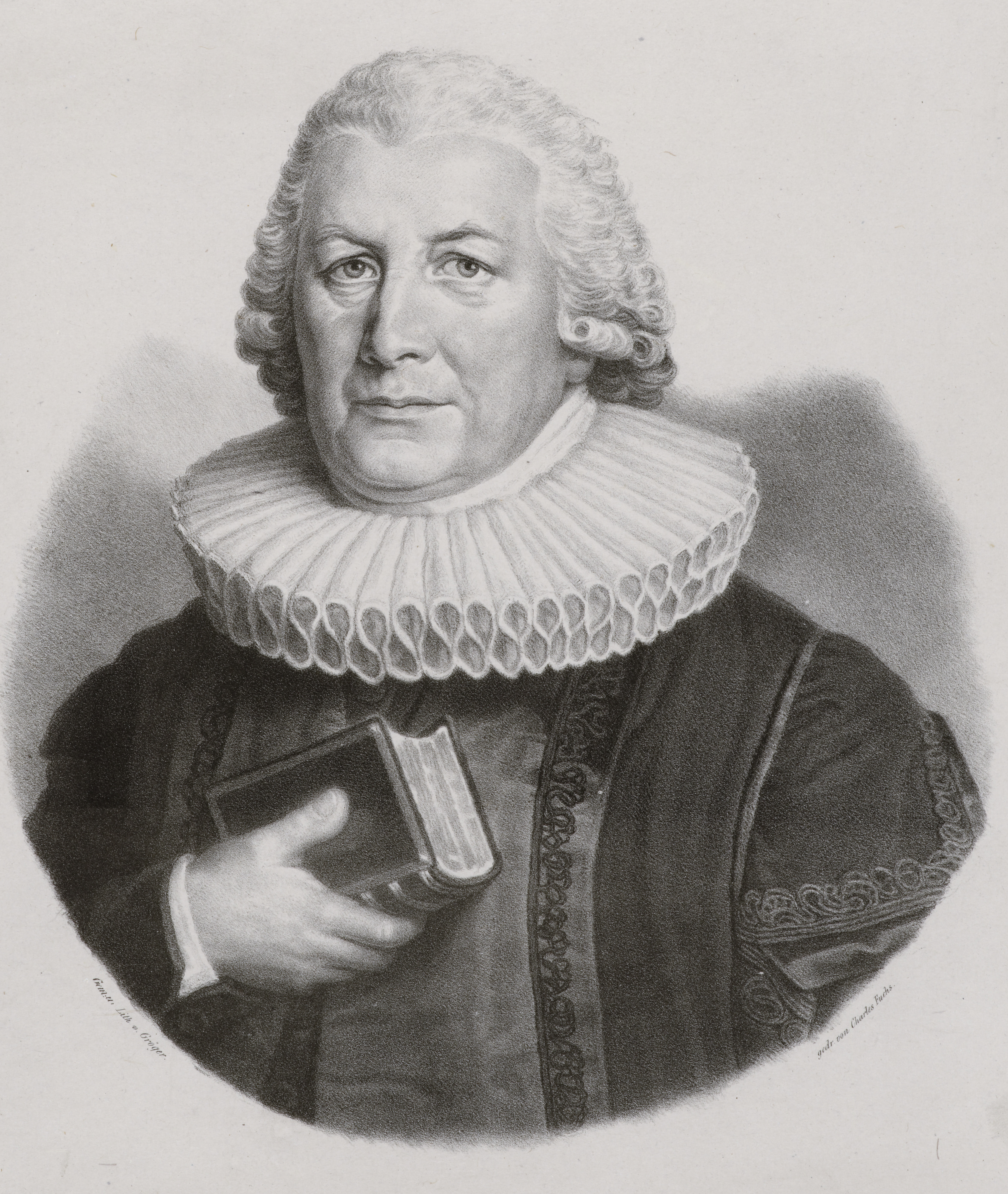 Bildnis von Nicolaus Joachim Guilliam Evers